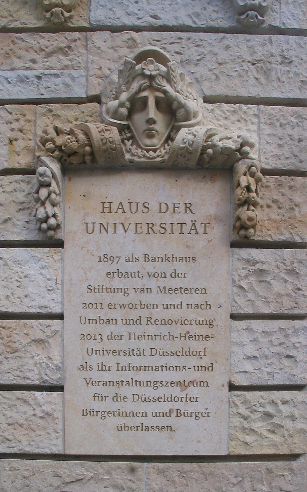 Düsseldorf, Haus der Universität, Veranstaltungszentrum der Heinrich-Heine-Universität, Schadowplatz 14 (auf der Balustrade). Erinnerungstafel.